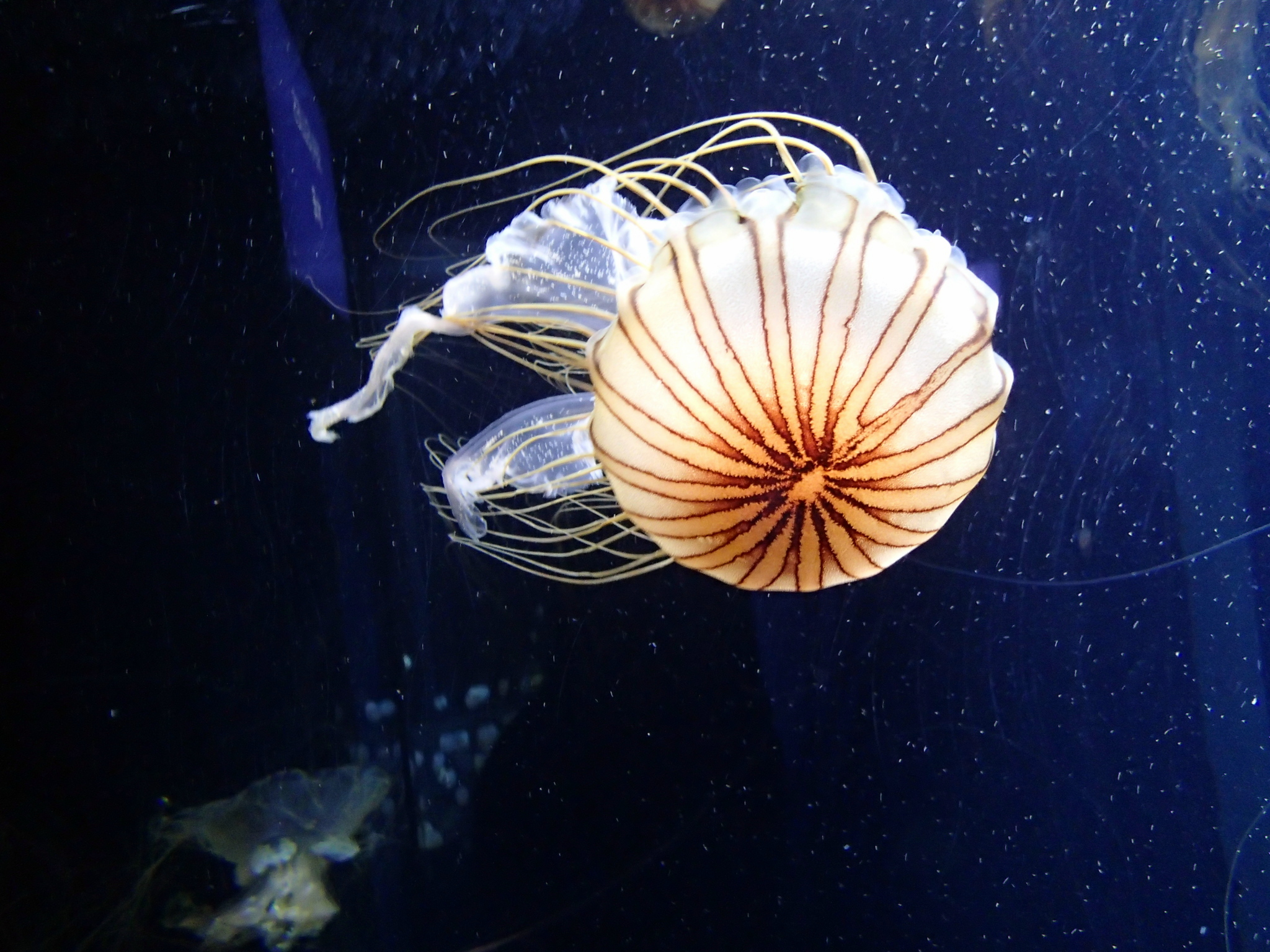 SEA Aquarium